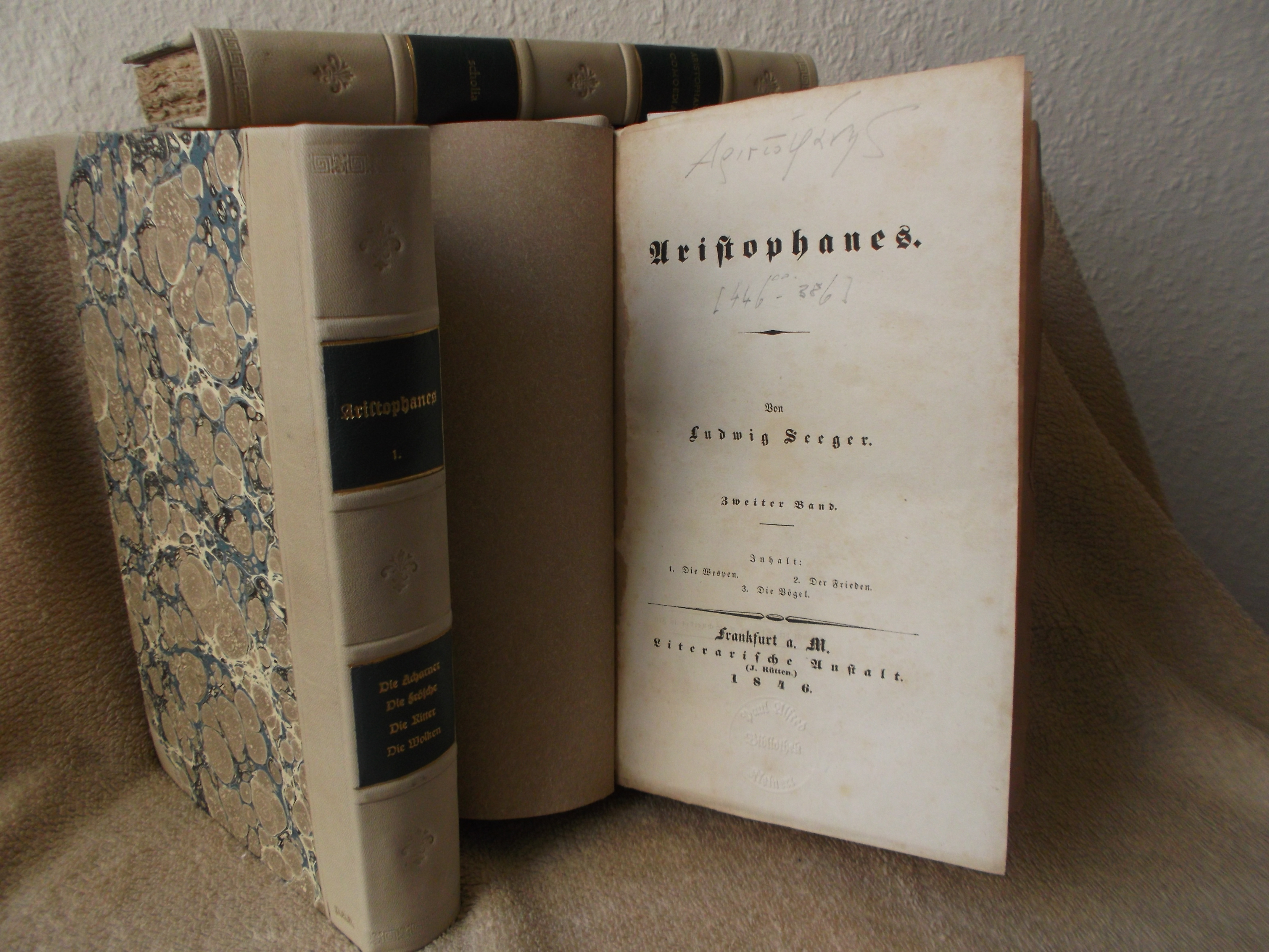 Abbildung eines Buches